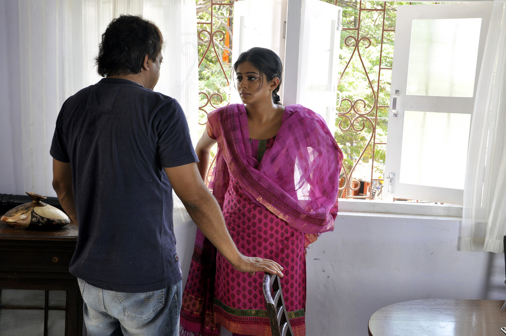 Rakta Charitra Working Stills (